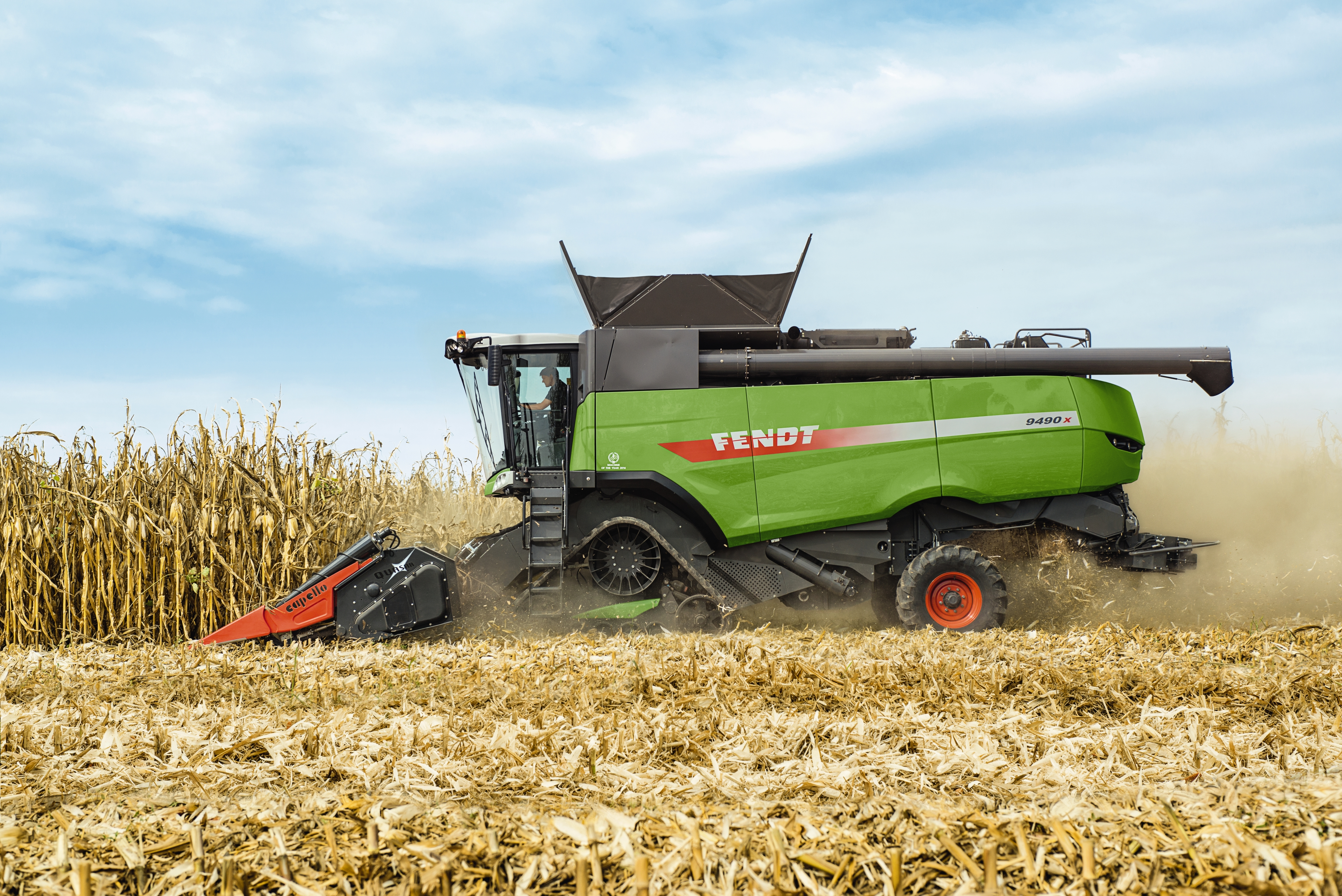 Fendt X-Serie